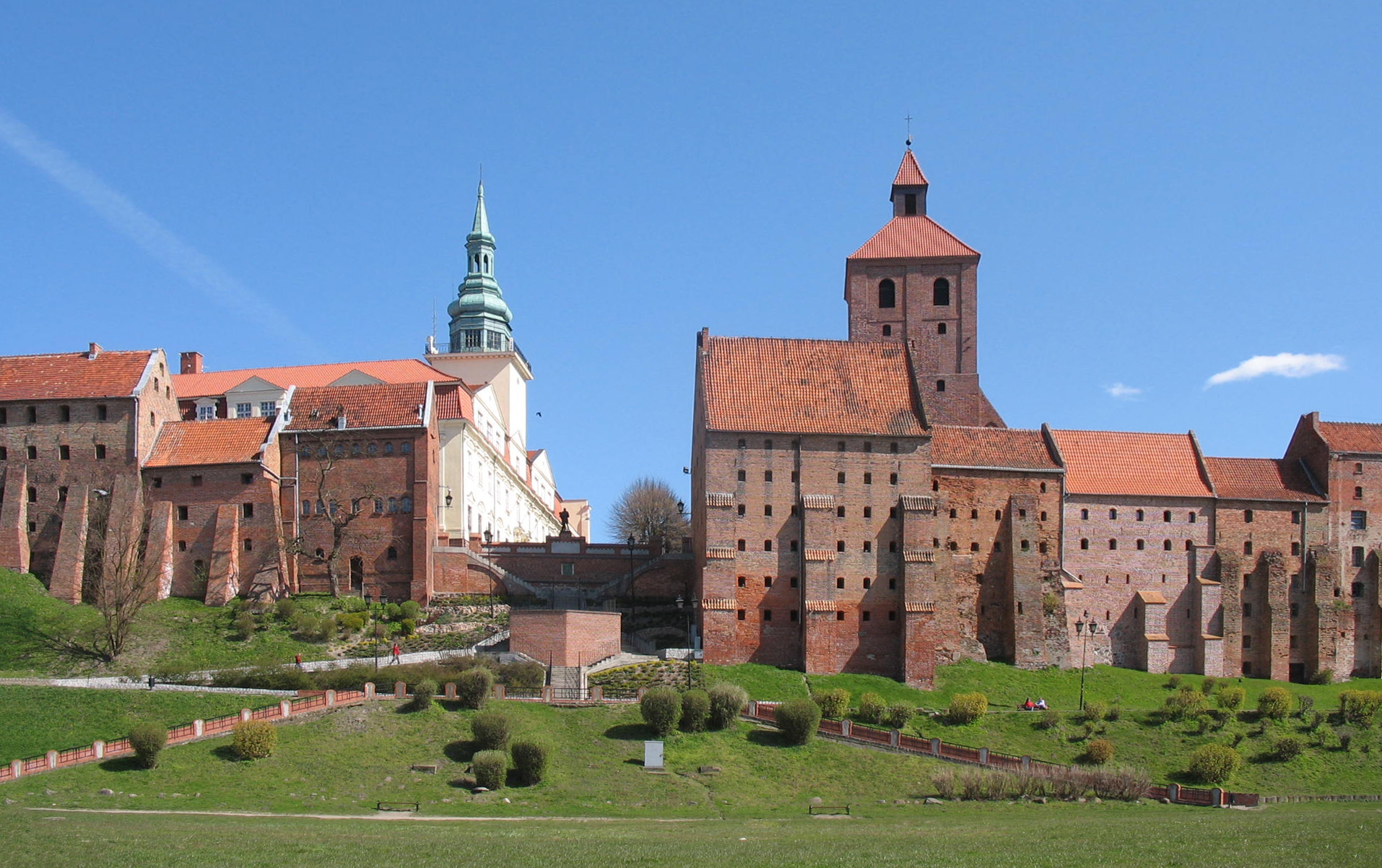 Spichlerze w Grudziądzu